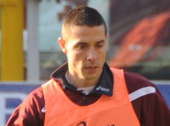 Saša Bjelanović nel riscaldamento di Torino-Roma